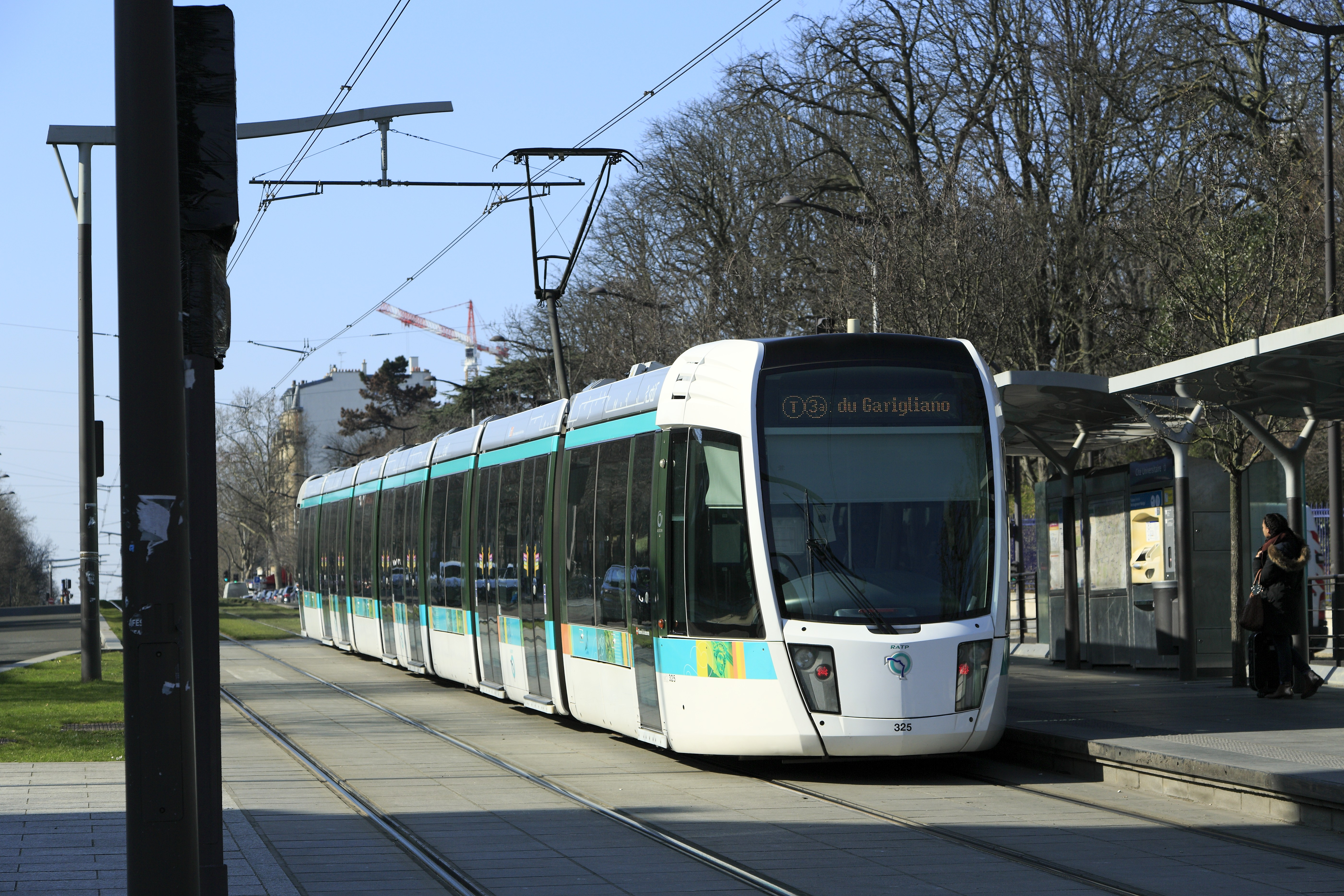 Zug der Linie T3a von der Porte de Vincennes zum Pont du Garigliano an der Haltestelle Cité Universitaire am Südrand des Parc Montsouris, Nachschuss. Hier besteht eine Umsteigemöglichkeit zur Strecke RER B.